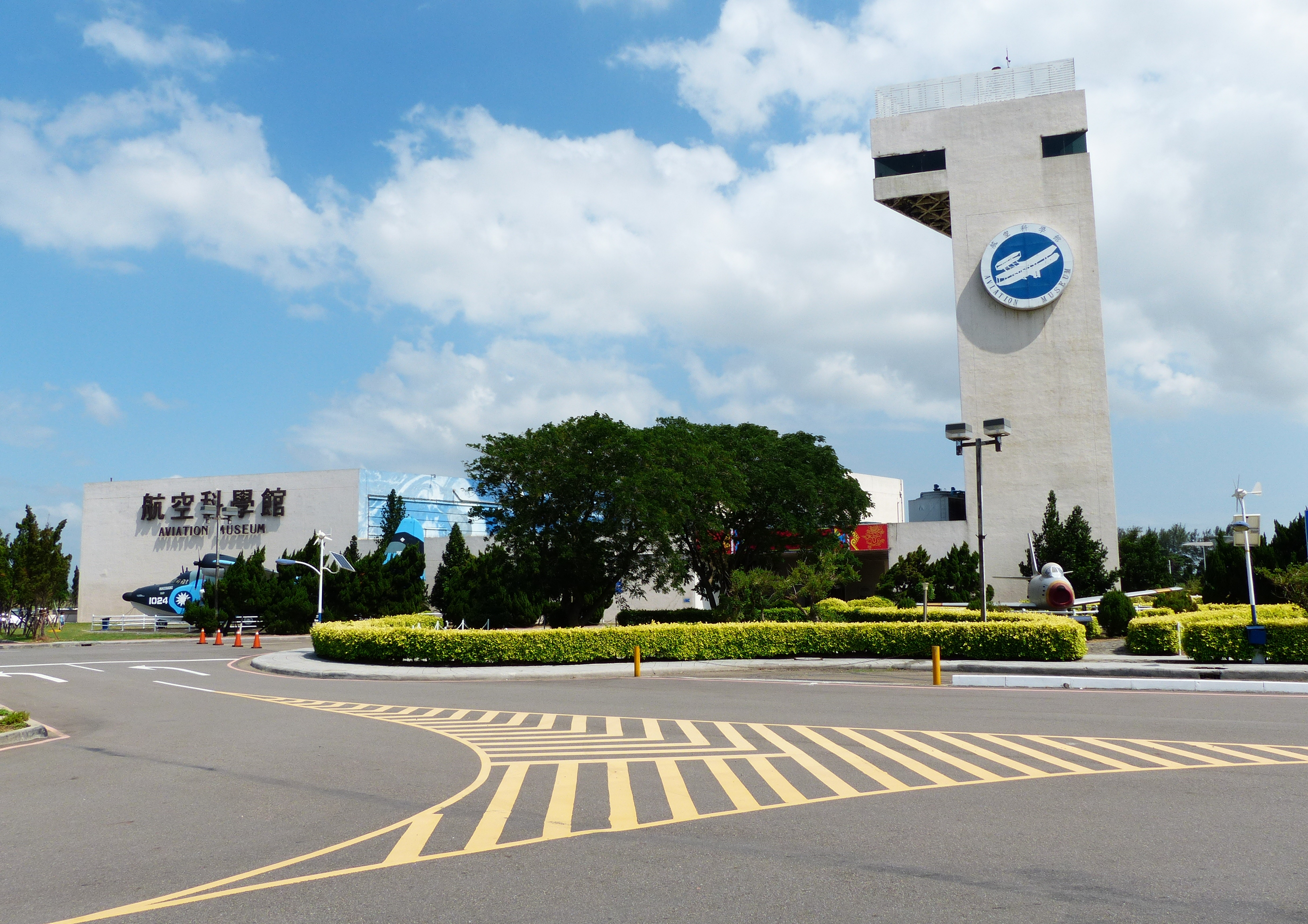 中文（台灣）: 由西方東望航空科學館。